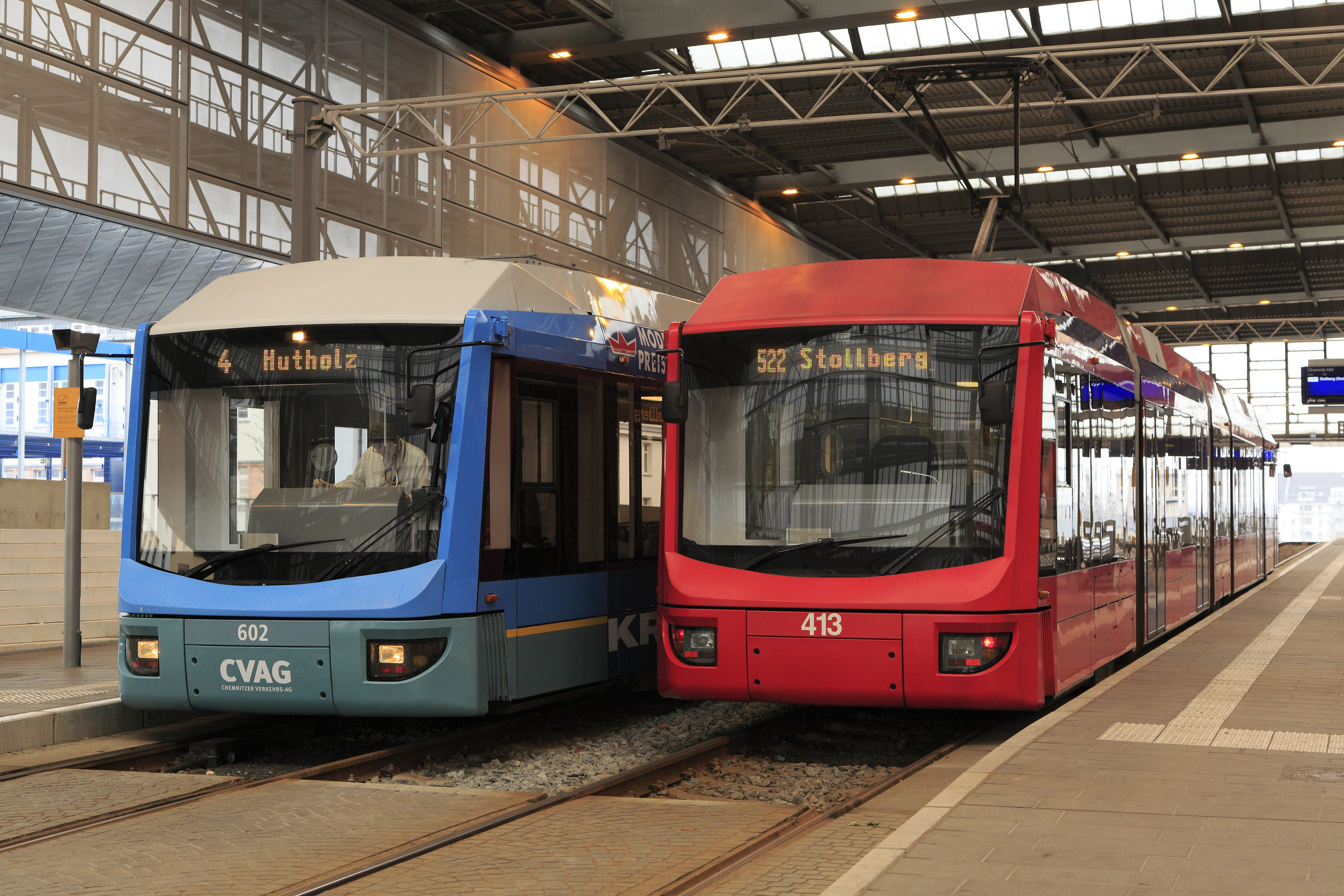 Die Führerstandsenden der Ein- und Zweirichtungswagen sind wagenbaulich identisch, die Unterschiede in Form von Radreifenprofil, Zugbeeinflussungseinrichtung, Funk und Pfeife sind von außen nicht zu erkennen. Die Züge der Linien 4 und 6/522 durchfahren die Wendeschleife in unterschiedlicher Richtung.